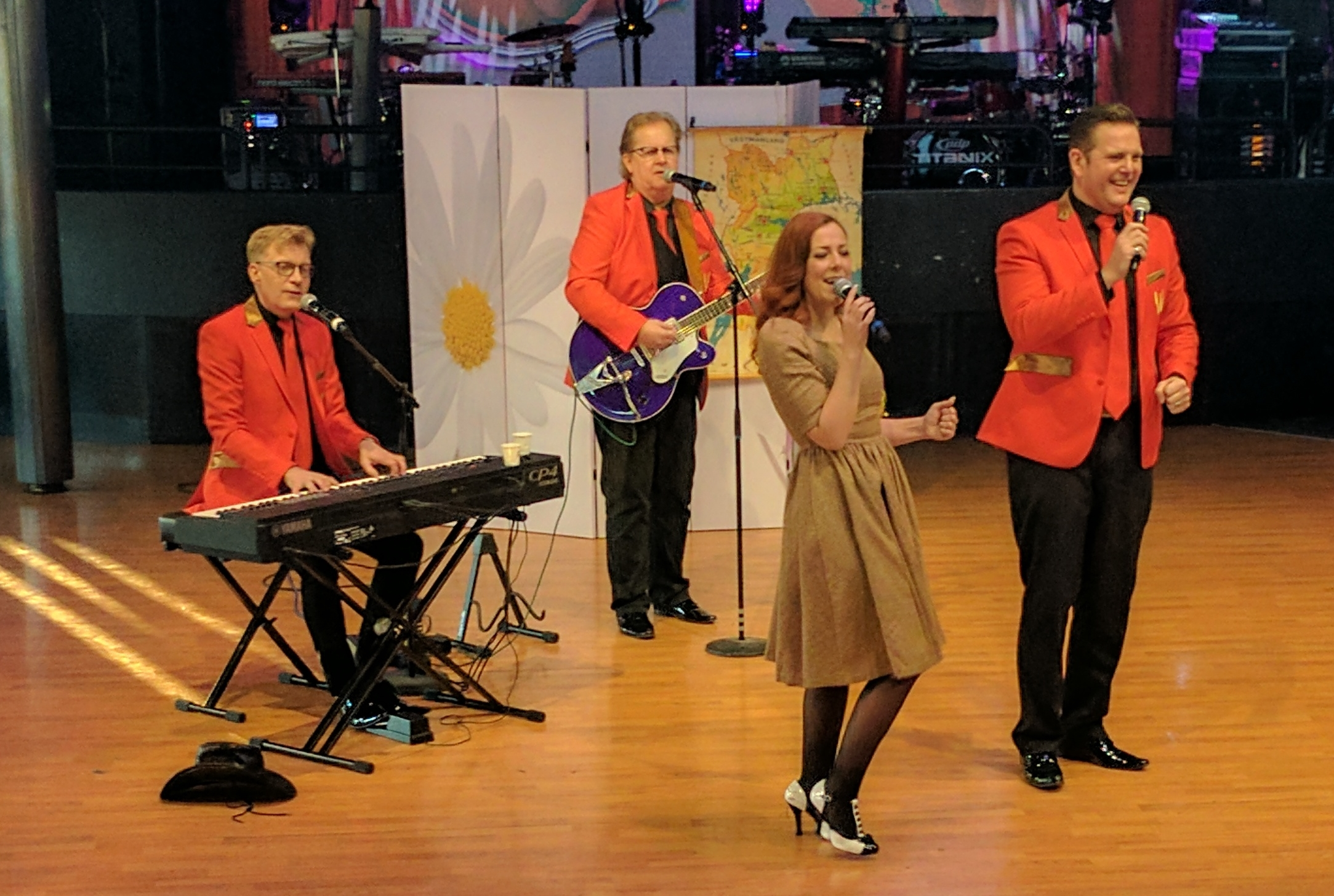 Wizex på Cinderella